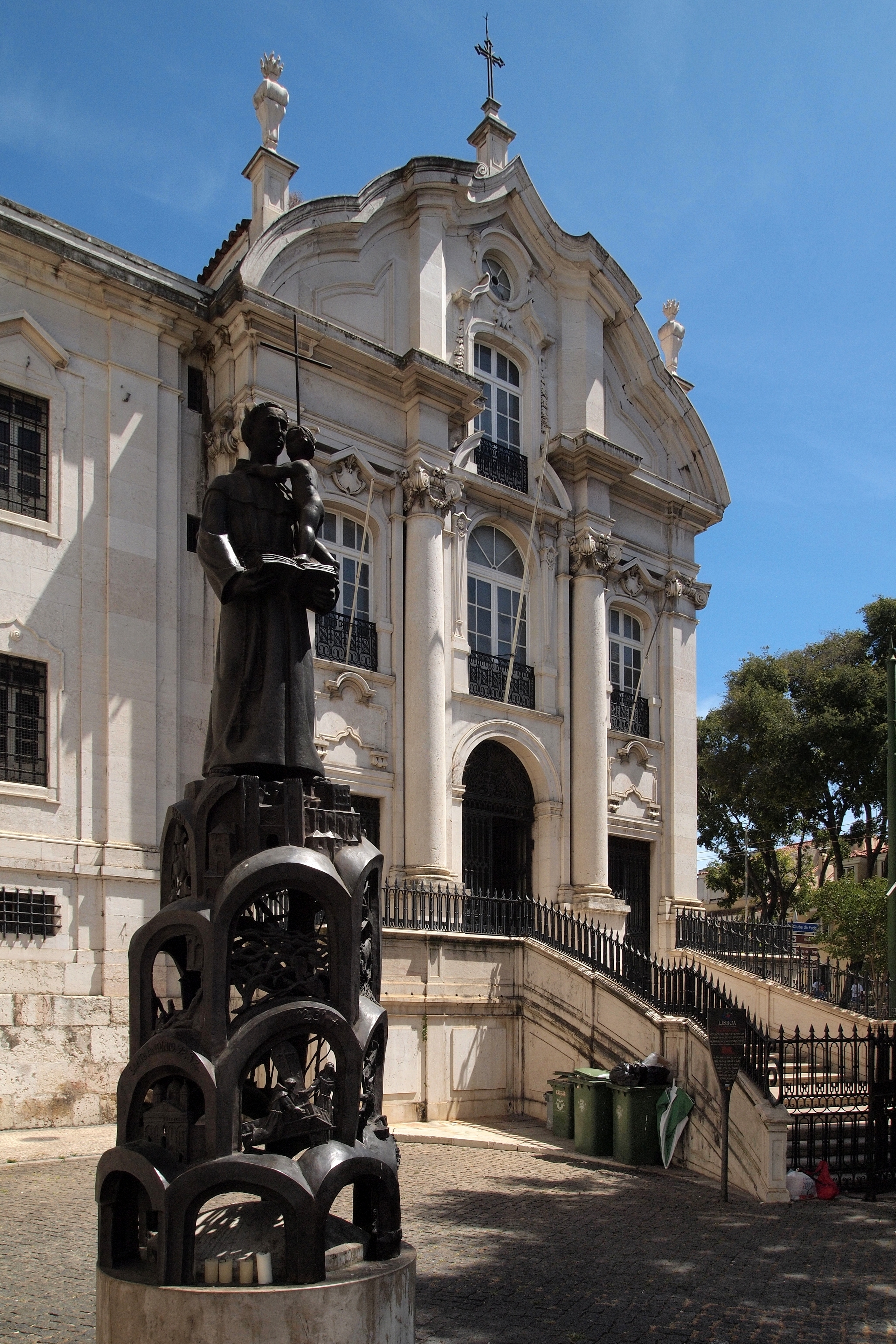 Lisbon